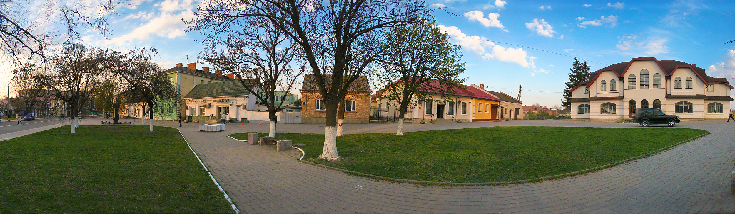 Market Square